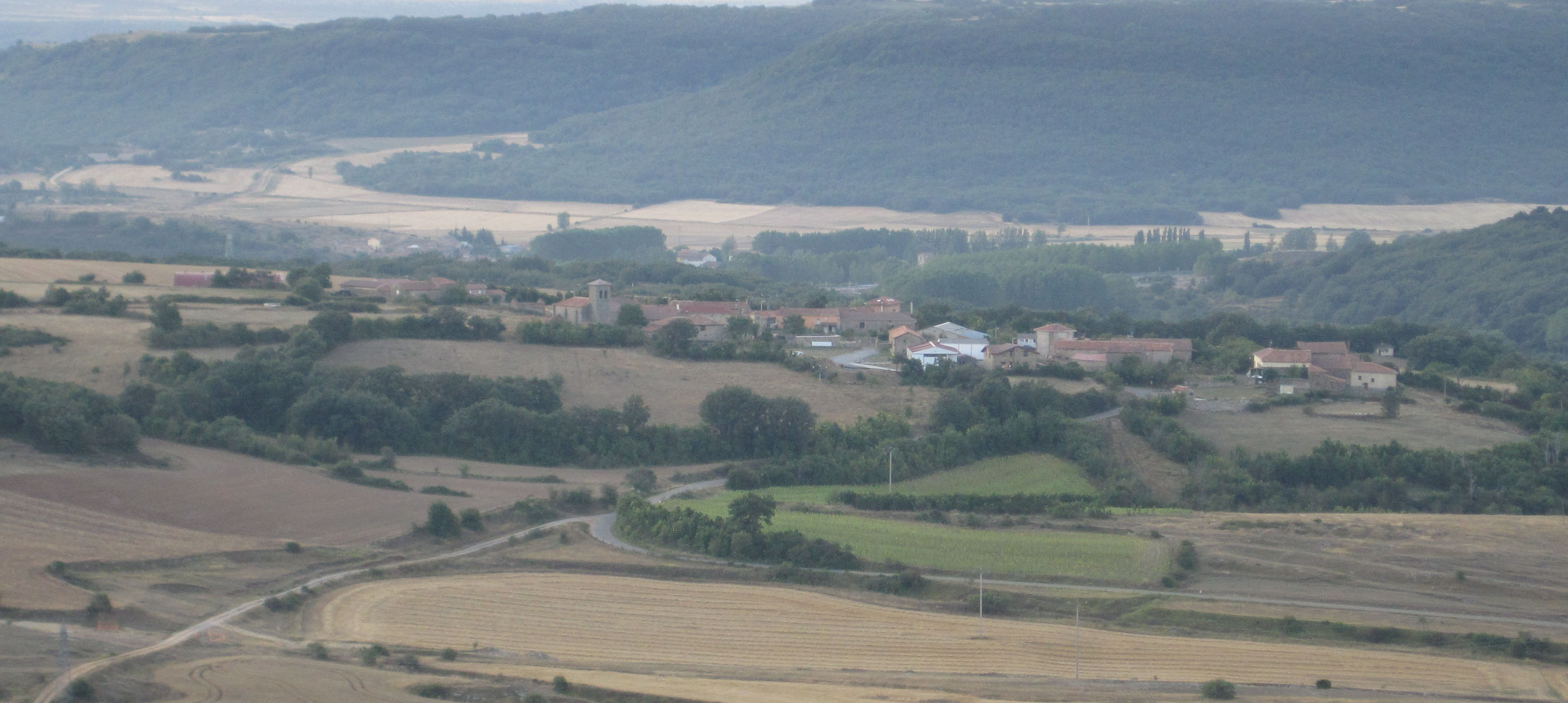 Vista aérea de Menaza (Aguilar de Campoo, Palencia, España).